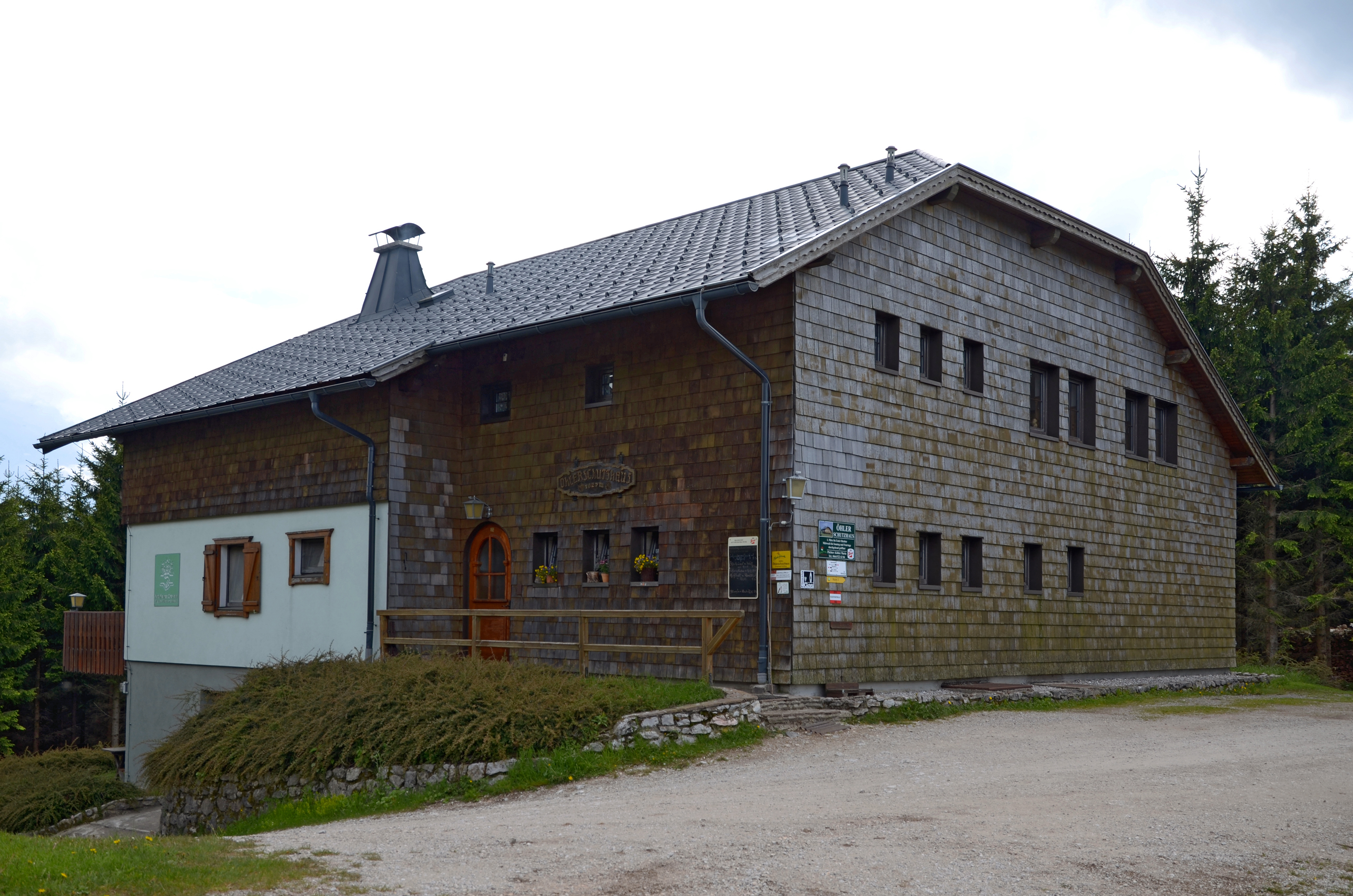 Niederösterreich, Marktgemeinde Puchberg am Schneeberg, Öhlerschutzhaus